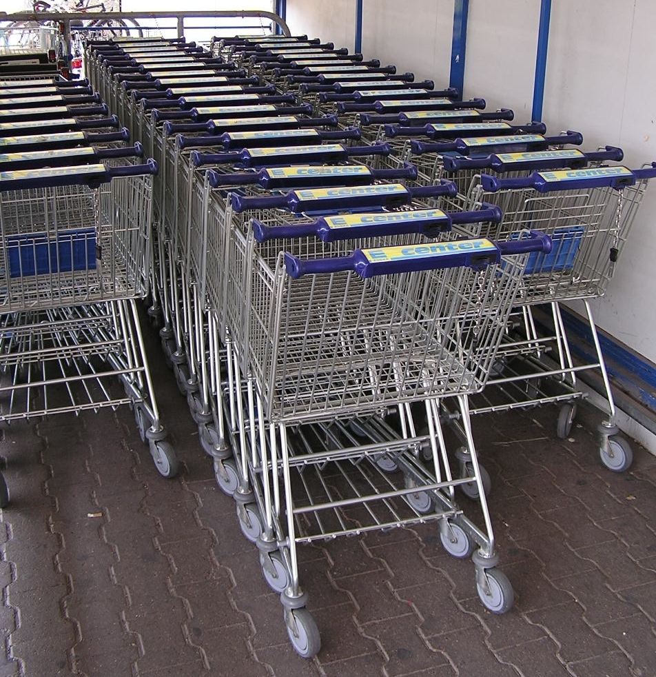 Einkaufswagen